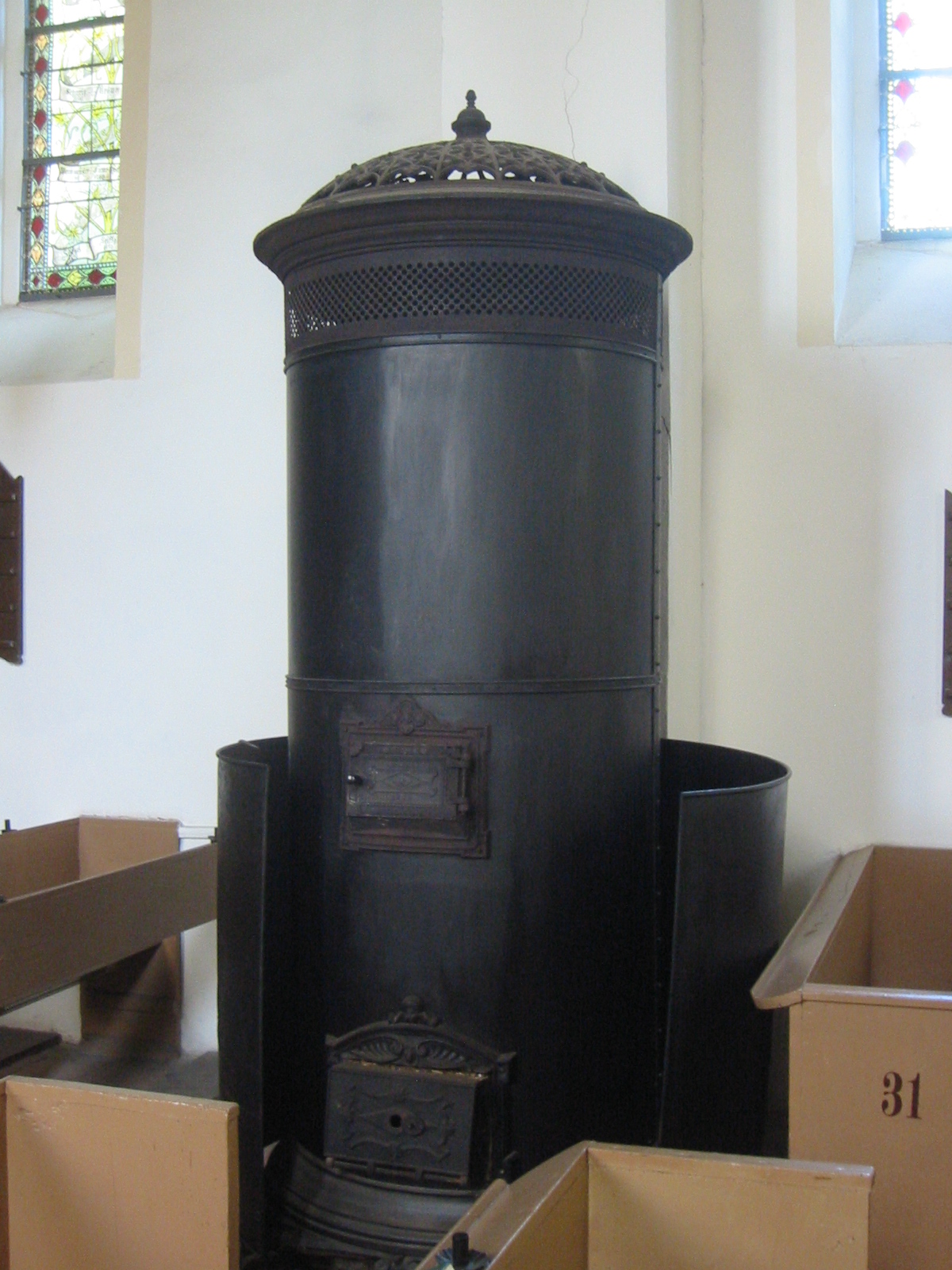 Ofen in der Dorfkirche Ringenwalde aus dem 13. Jahrhundert, heute Gemeinde Temmen-Ringenwalde, Uckermark (Brandenburg)